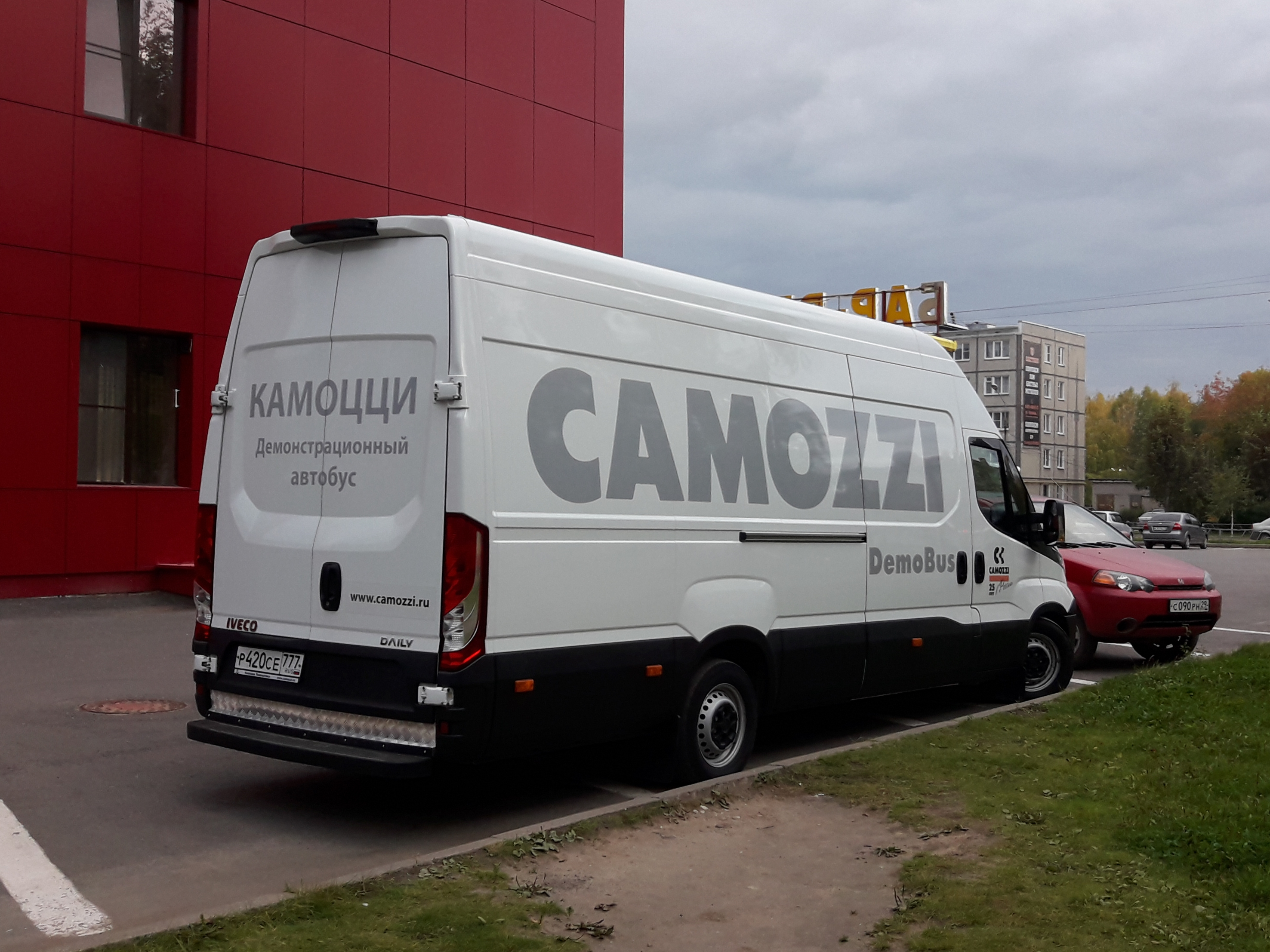 Camozzi DemoBus